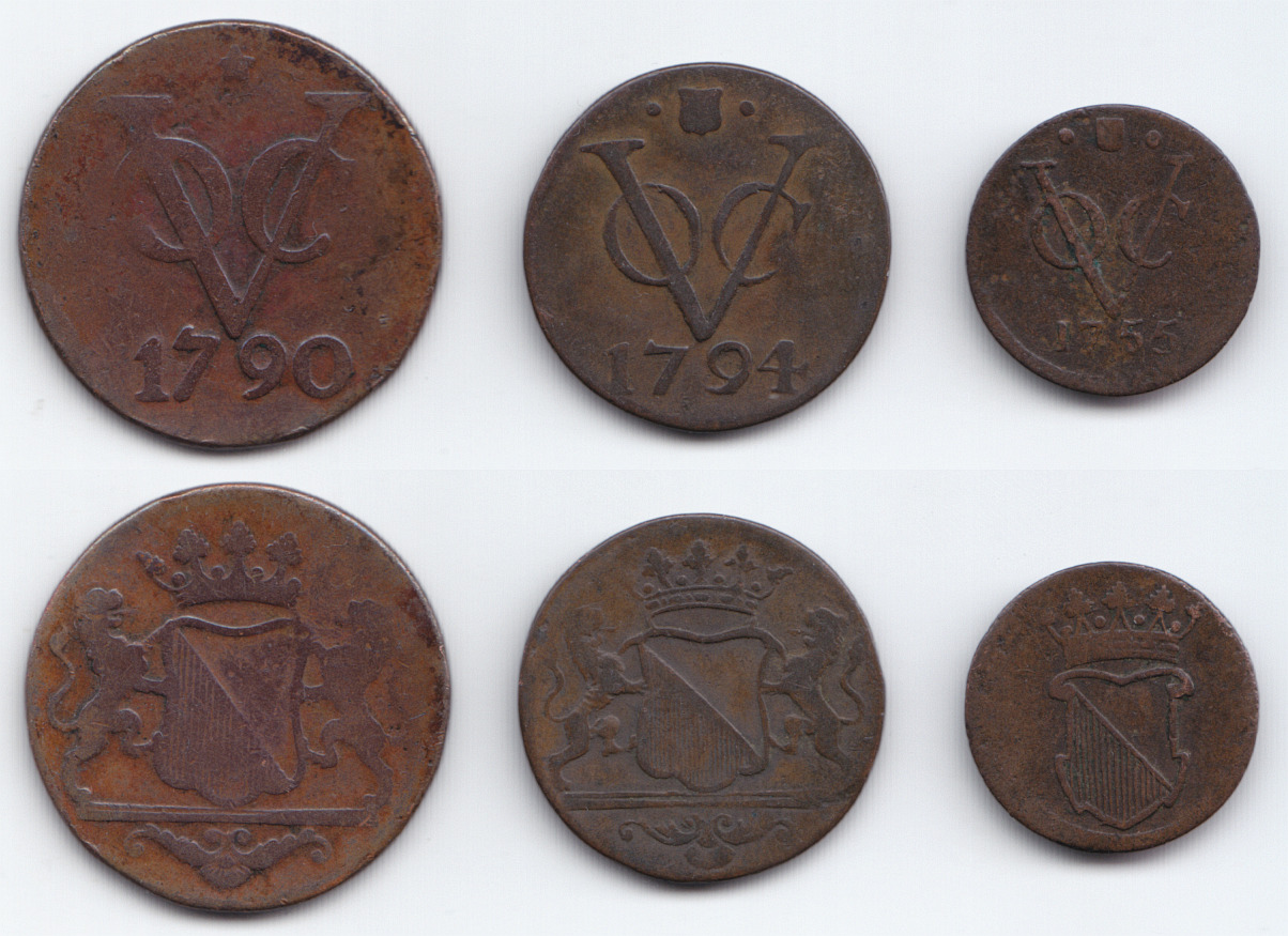 Сравнение монет: двойной дуит, дуит, и 1/2 дуита. Голландская Ост-Индийская компания. Отчеканено для Нидерландской Ост-Индии в городе Утрехте. 1790, 1794 и 1755 гг. Вес соответственно: 6.35, 2.78 и 1.29 гр.